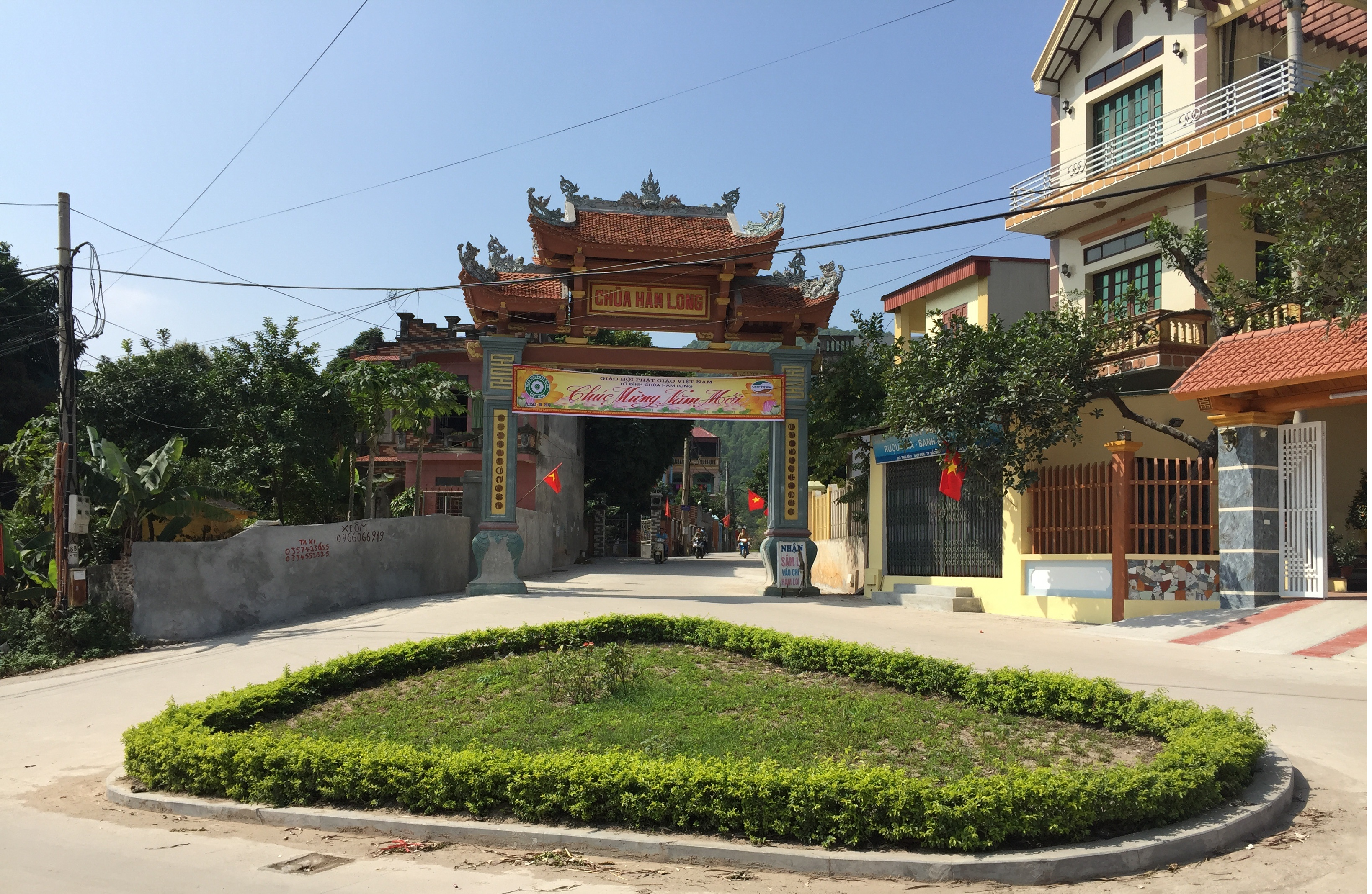 Đường dẫn vào cổng chùa Hàm Long dịp Tết Nguyên đán Kỷ Hợi (2019)